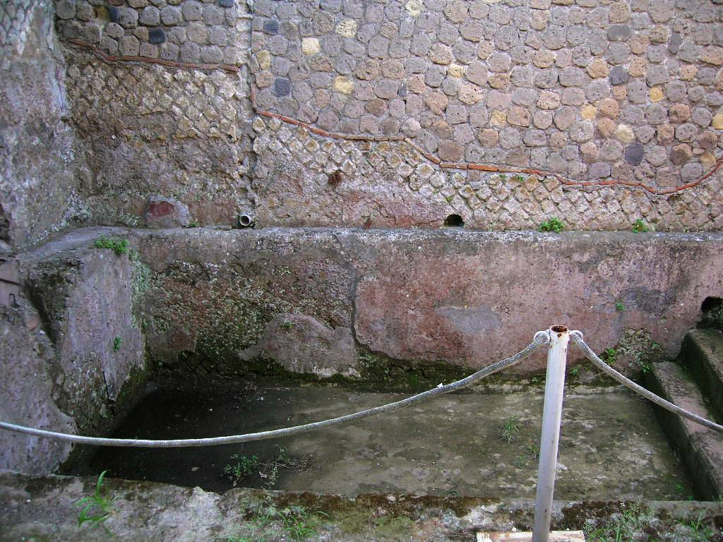 Frigidarium della Villa San Marco a Stabia. Foto di user:Mentnafunangann, 15 agosto 2006.